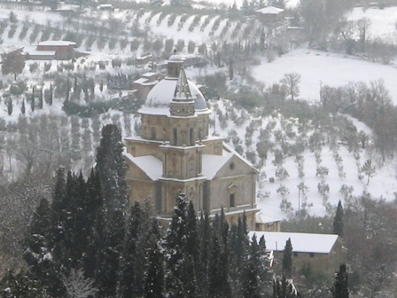 Panoramica di San Biagio in Montepulciano.